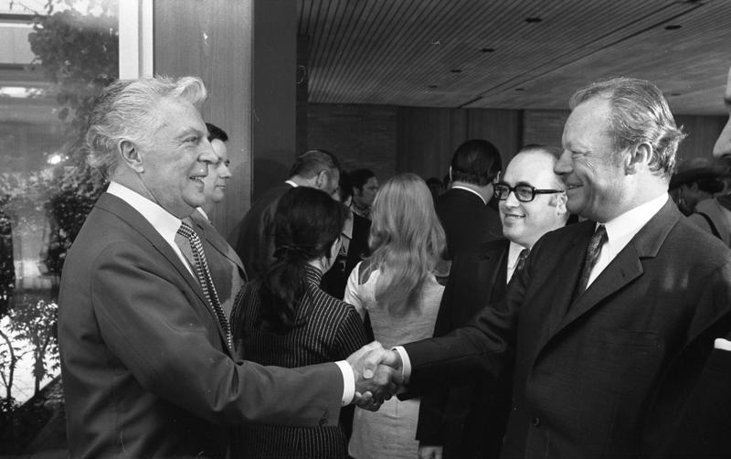 Bundeskanzler Willy Brandt empfängt Filmschauspieler